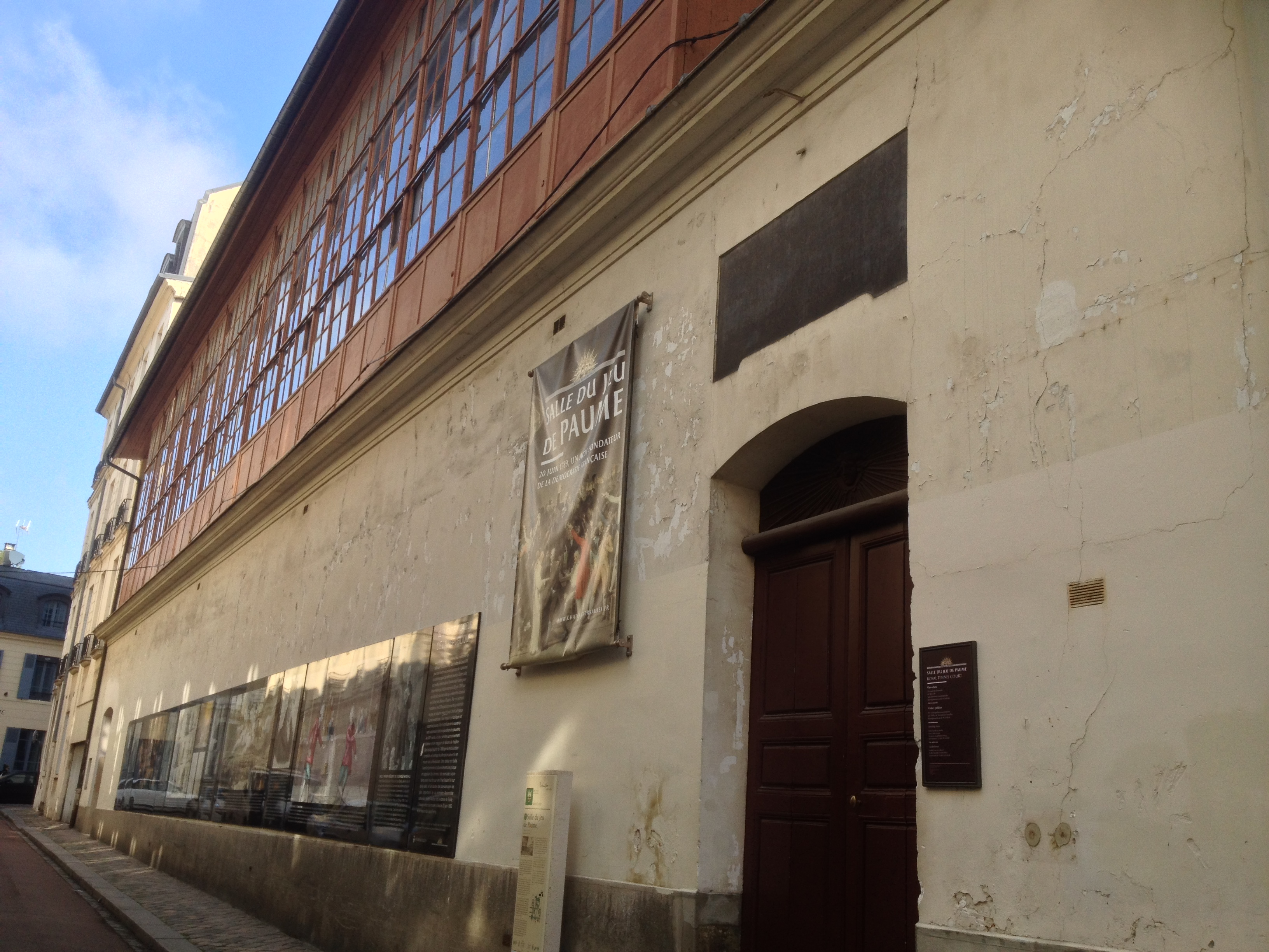 la salle du Jeu de Paume de Versailles, son extérieur